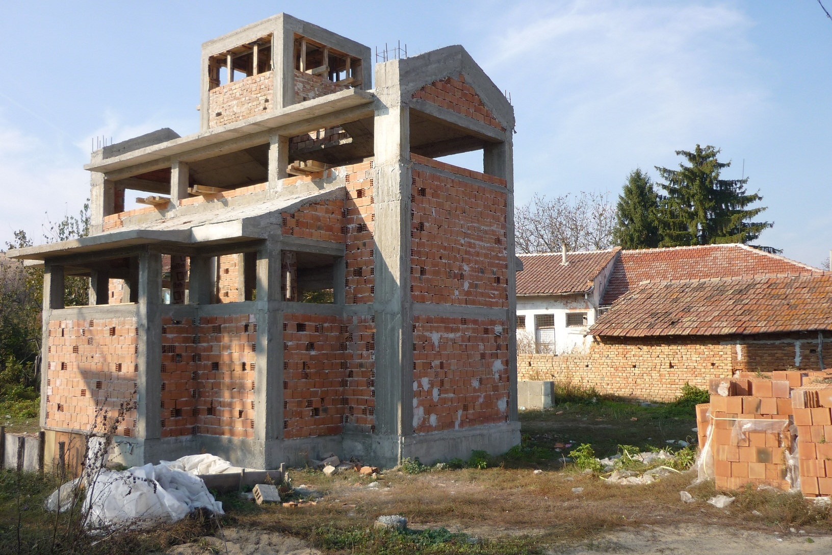 Църквата, все още в строеж